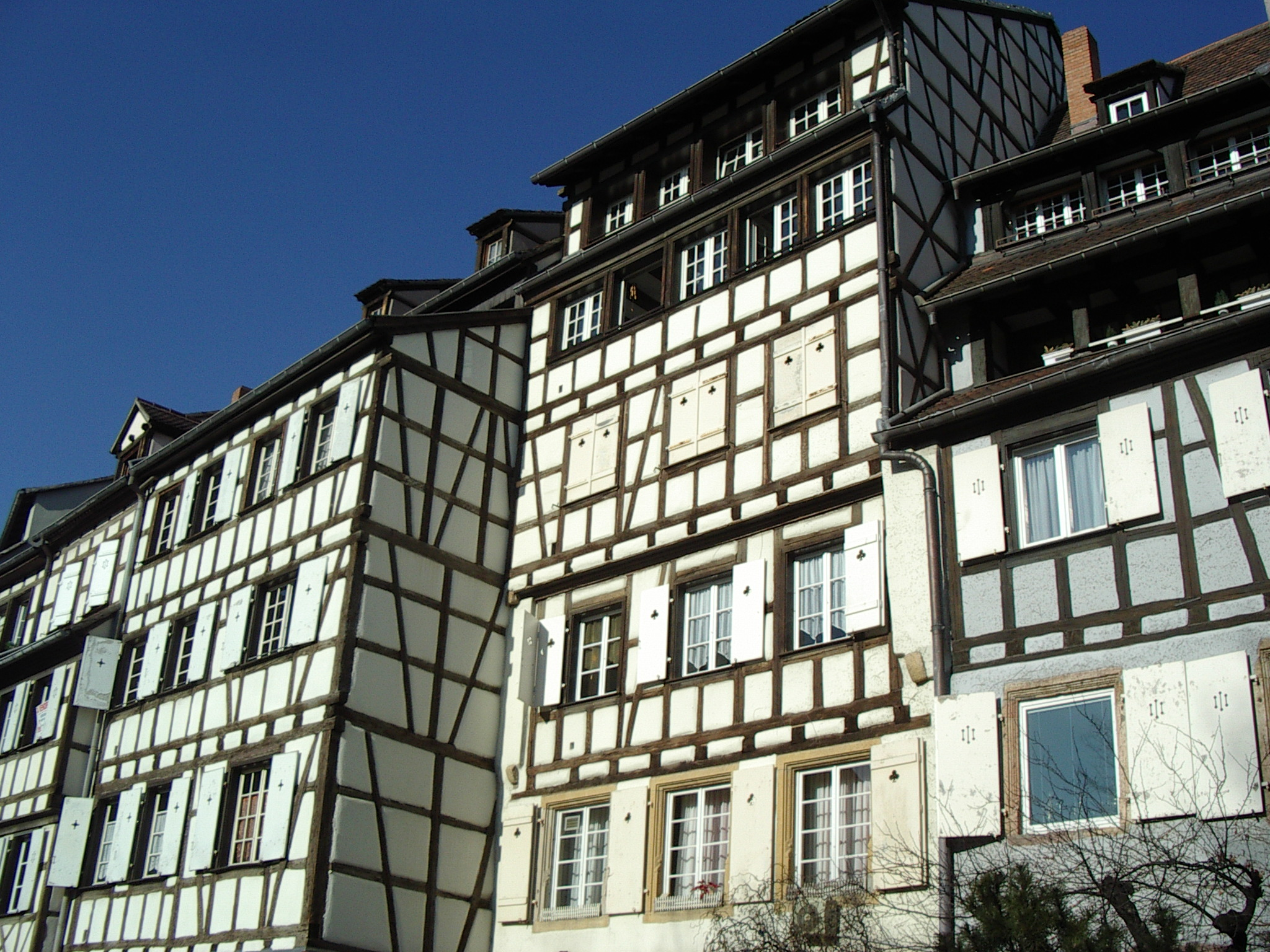 Le quartier des tanneurs à Colmar (Alsace, France).